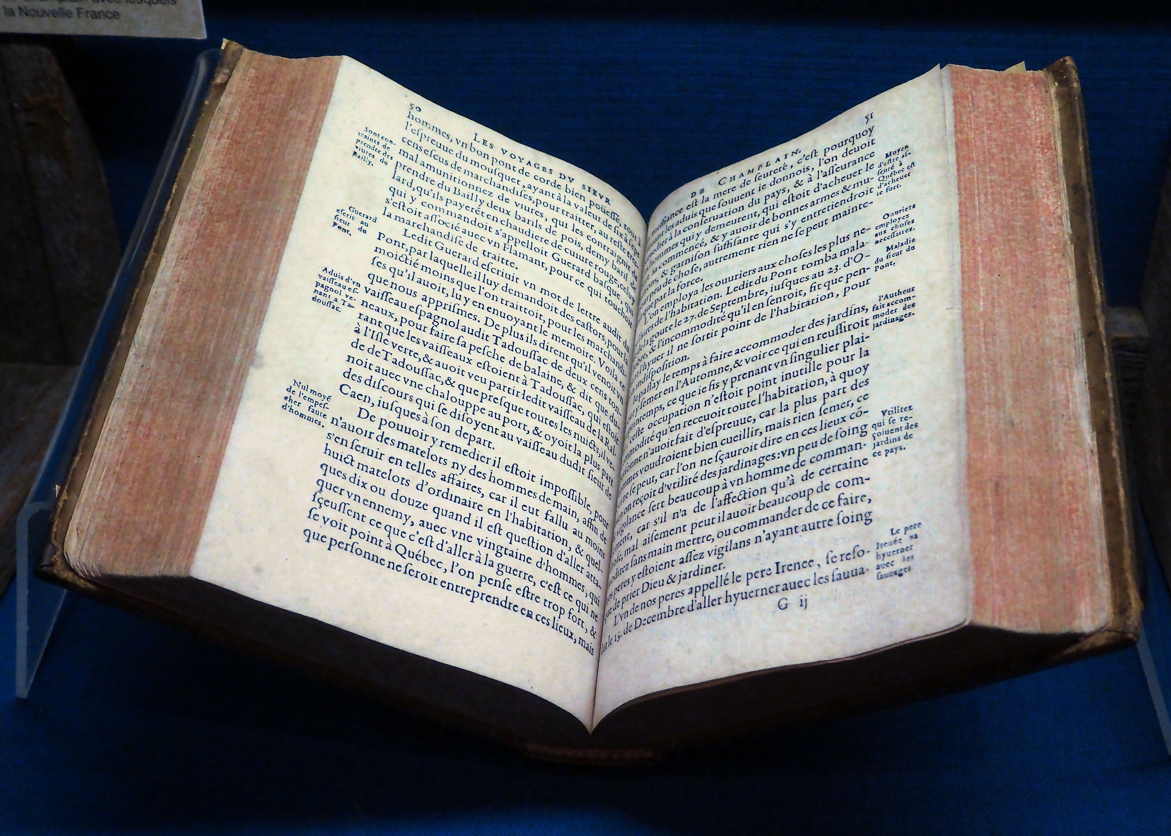 Voyages de Champlain, Édition de 1632 (musée Sainte-Marie-au-Pays-des-Hurons, Ontario)